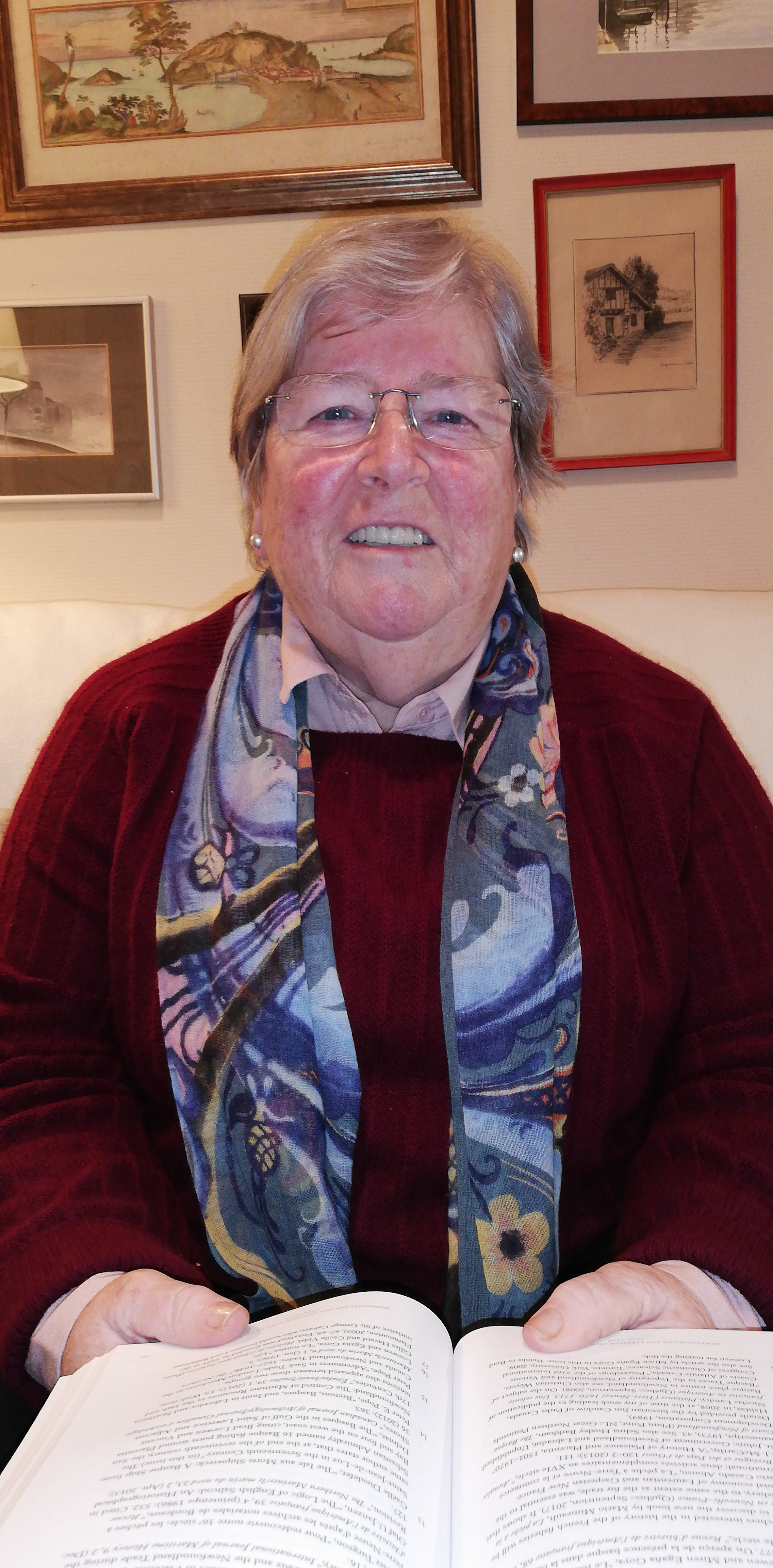 Miren Egaña Goya Donostiako maistra